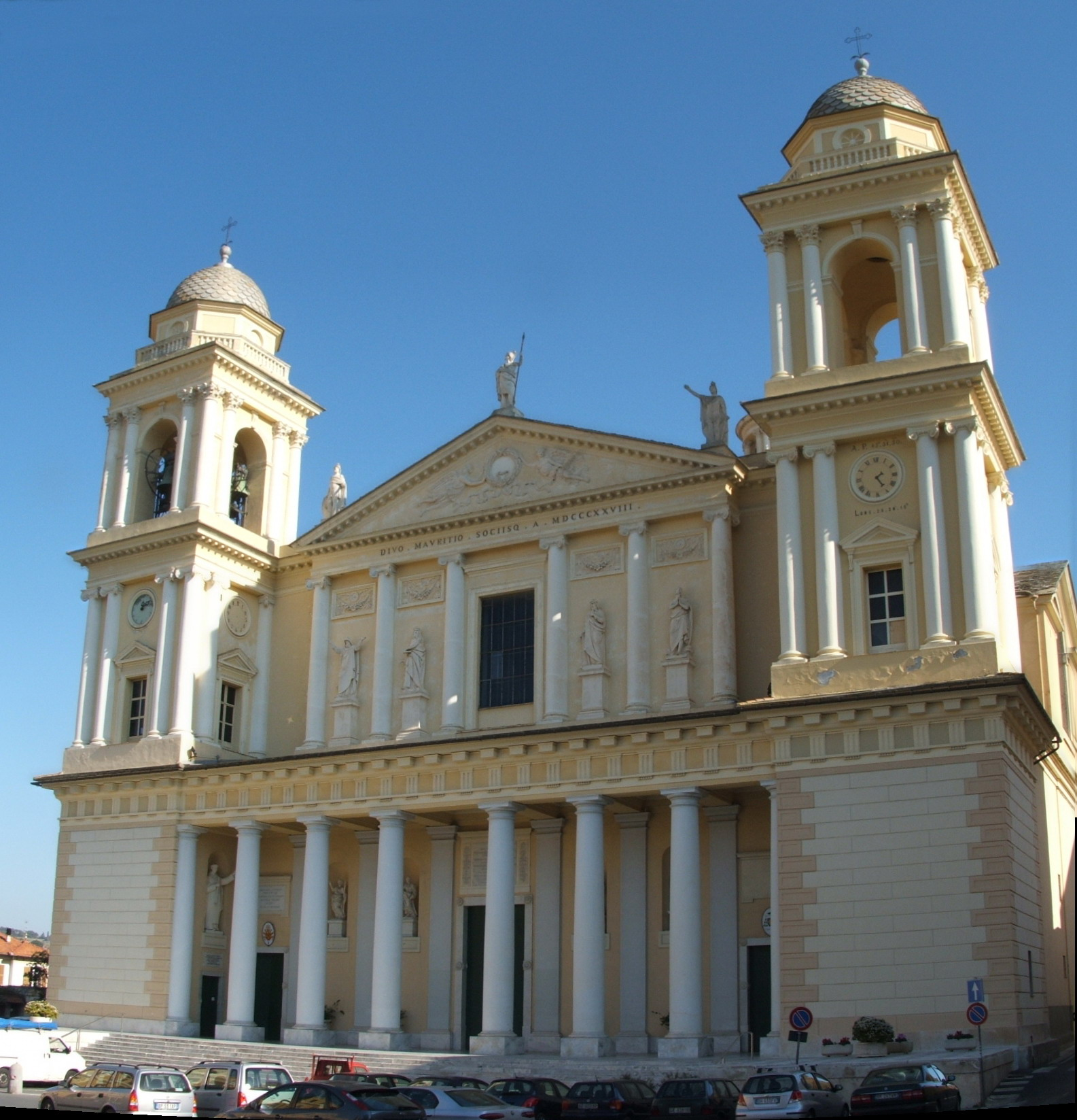 Immagine da Imperia Basilica di San Maurizio al Parrasio